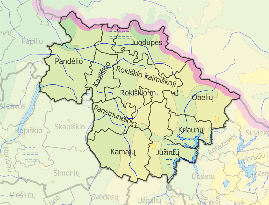 Padaryta iš :image:LietuvosSeniunijos.png